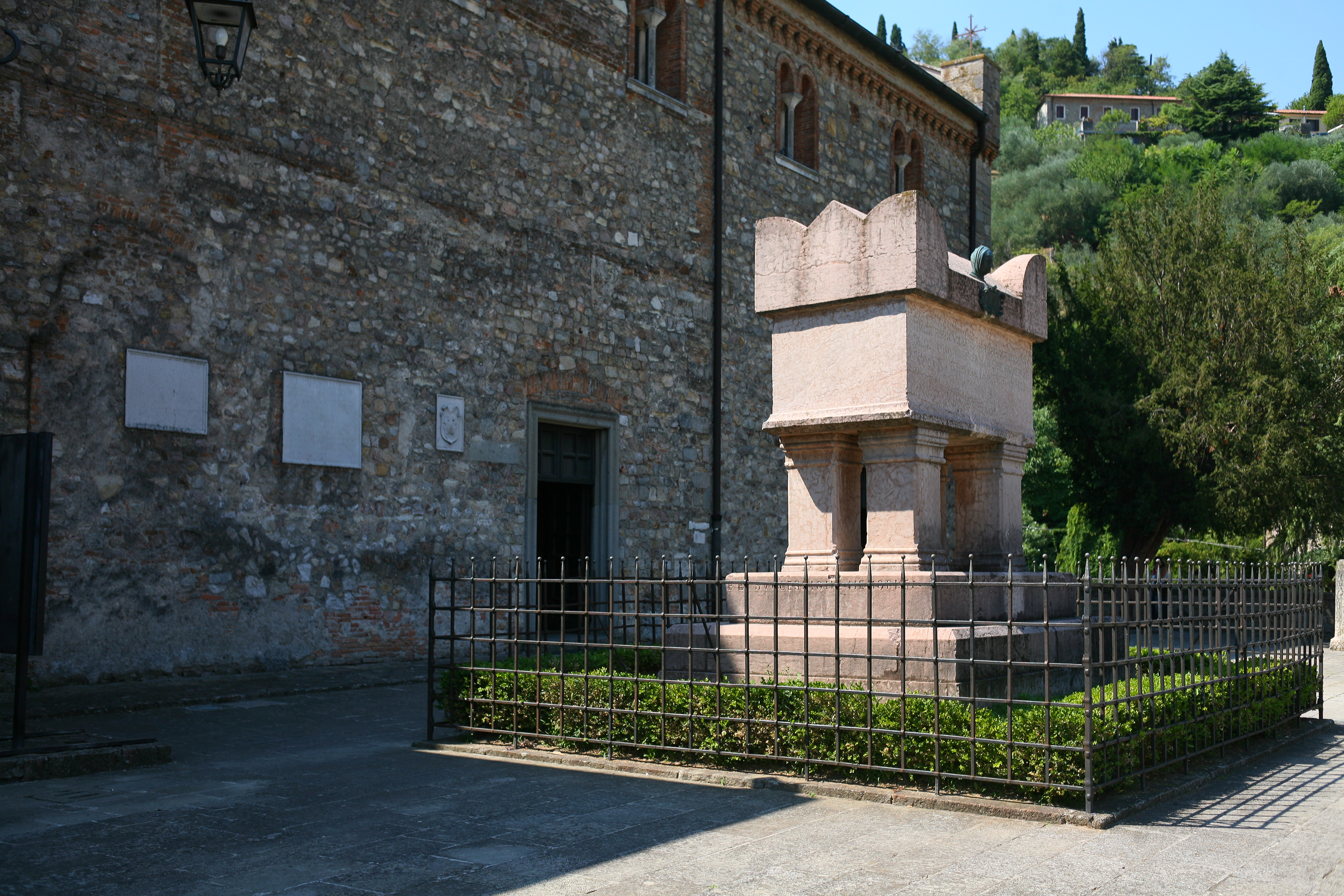 La tomba di Francesco Petrarca ad Arquà Petrarca (PD)